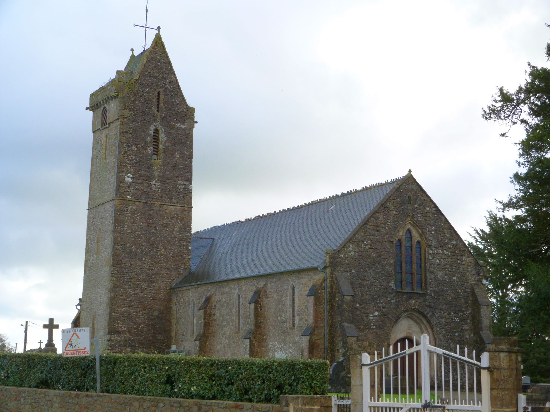 Église Notre-Dame de Couville